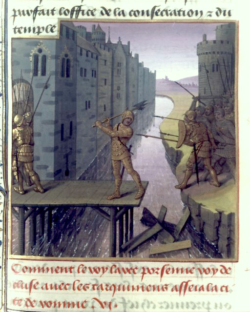 BnF Français 273-274 Tite-Live de Versailles, fol. 49, Horatius Coclès défendant Rome